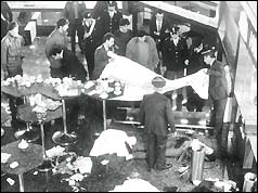 L'Aeroporto di Fiumicino di Roma il giorno 27 dicembre 1985, poco dopo l'attentato da parte di estremisti palestinesi.